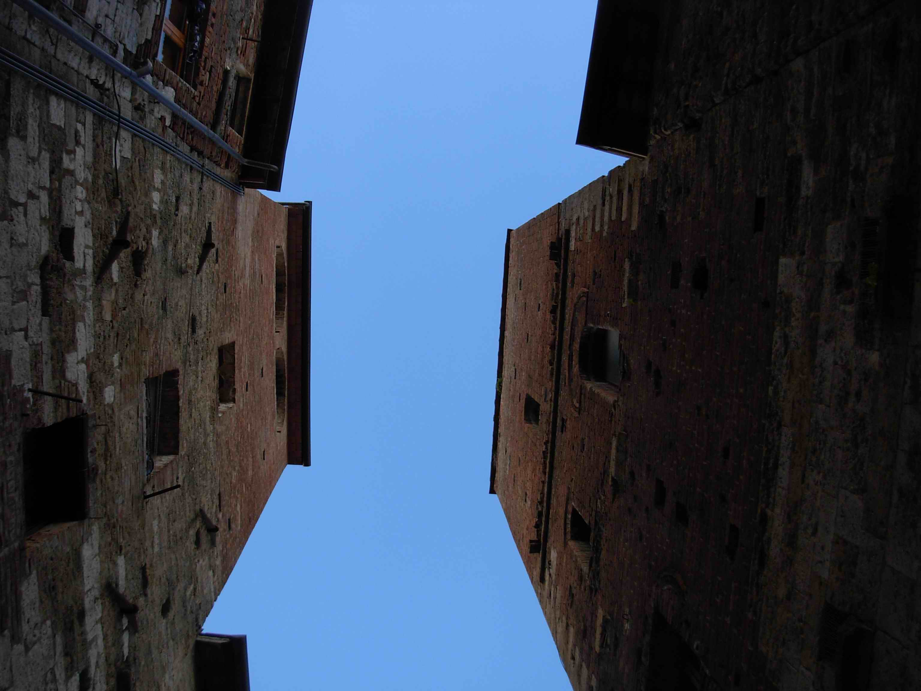 Colle di Val d'Elsa (Siena-Italia): La Torre di Arnolfo e la Torre dei Pasci